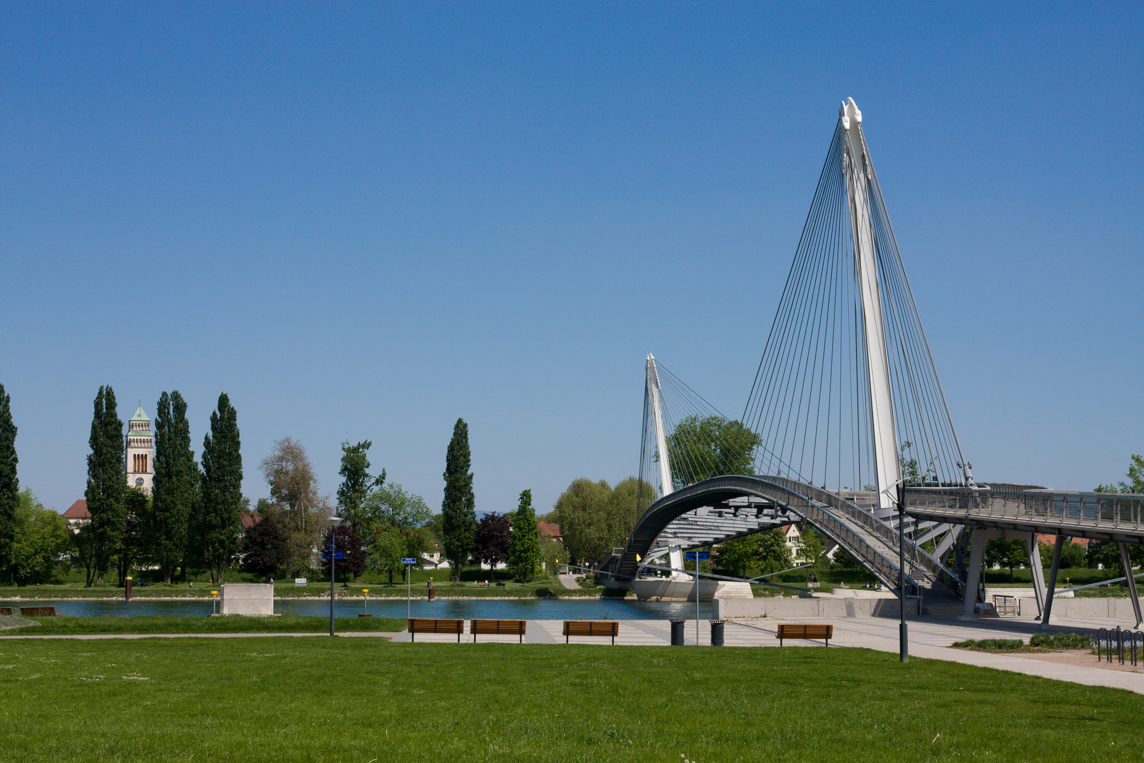 La passerelle Mimram du Jardin des deux rives, Strasbourg, France